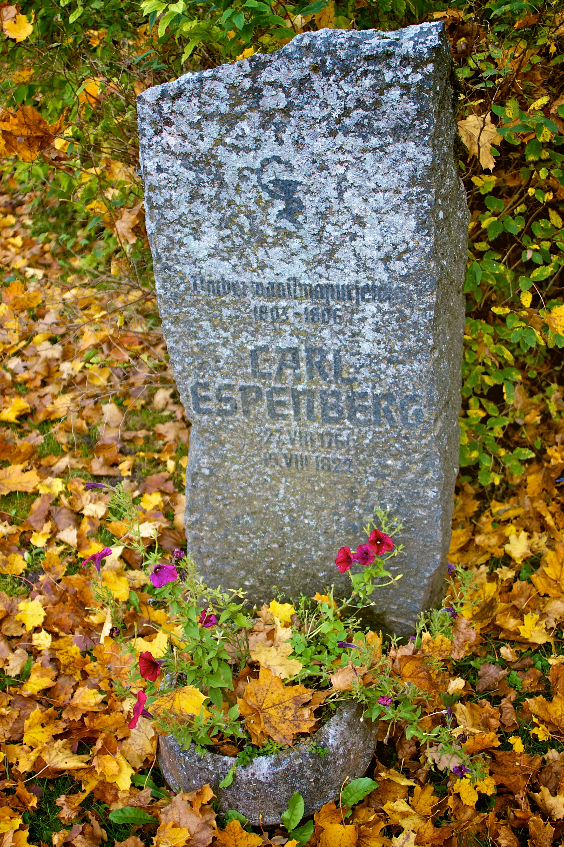 Carl Espenbergi hauakivi